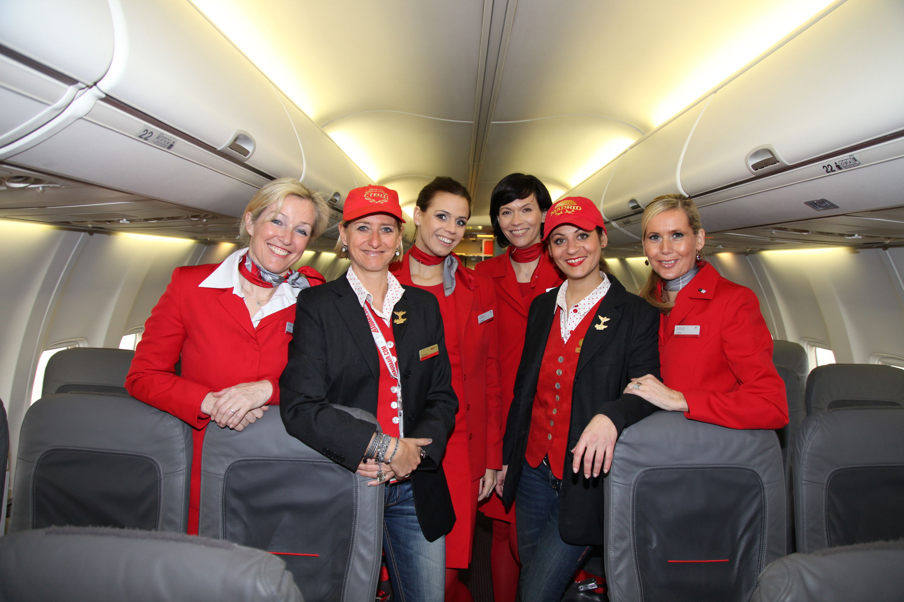 Lauda Air Abschied Boeing 737